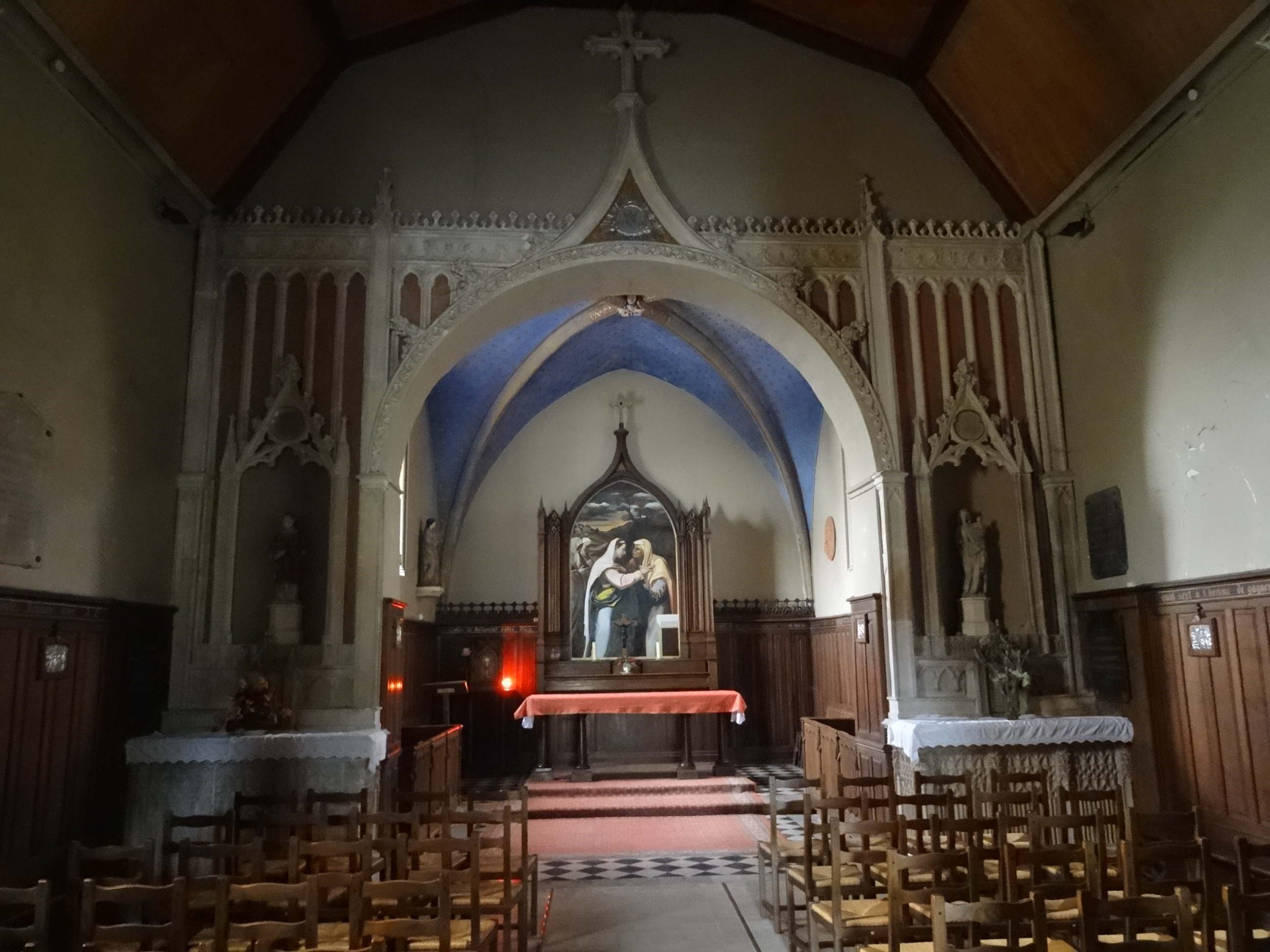 Église Notre-Dame de la Visitation de La Rochette. (Seine-et-Marne, région Île-de-France).